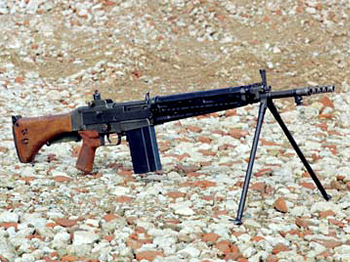 [口径]7.62mm [全長]約990mm [銃身長]450mm [重量]約4.4kg（脚付、弾倉を除く） [作動方式]ガス利用衝撃式 [給弾方式]箱弾倉 容量20発 [製作]豊和工業 37年から研究開発され、39年に仮制式になった国産小銃である。軽量、小型で日本人の体格に適合し、自動、半自動の切り替えが可能。従来の小銃M1と自動銃（BAR）の特性を兼ね備えており、短、連発ともに命中精度は良好である。本小銃用として同時に銃剣、照準眼鏡及び演習用の空包発射補助具等も並行して開発されている。